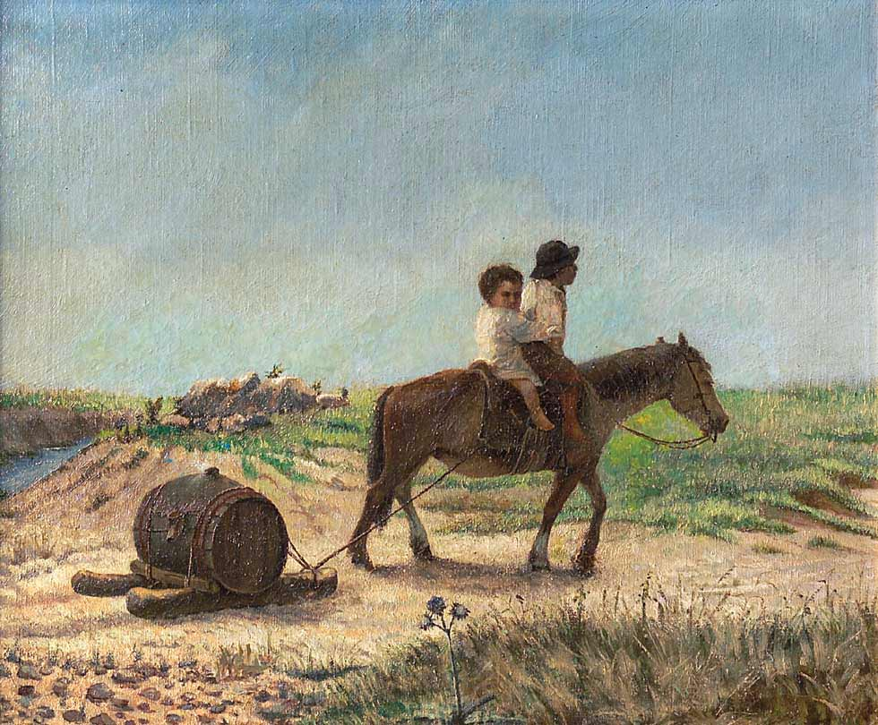 Obra del pintor uruguayo Horacio Espondaburu (1855-1902) “Niños a caballo”, óleo sobre tela de 38 x 46 cm.